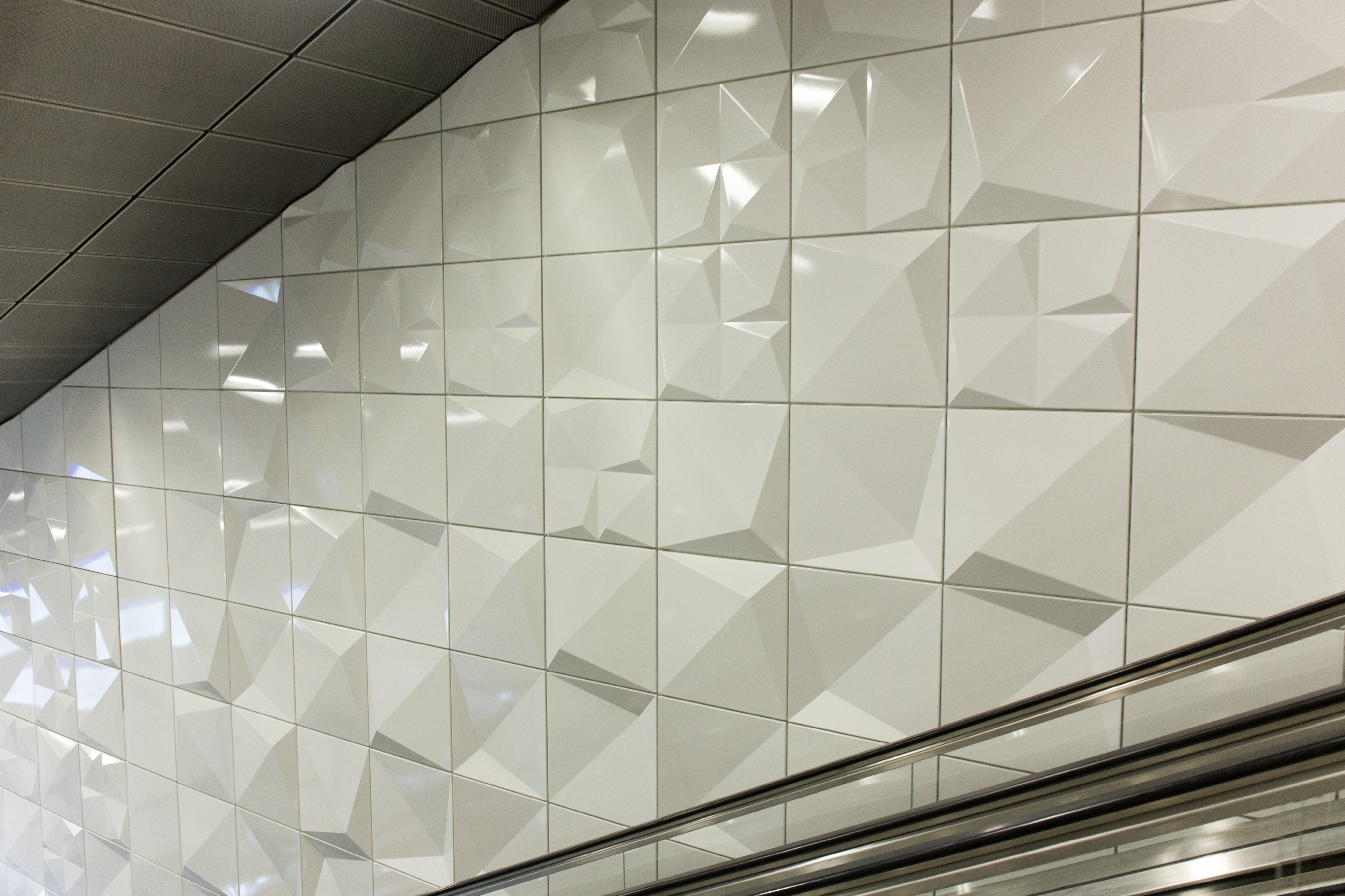 Wehrhahnlinie, Heinrich-Heine-Allee Wandverkleidung